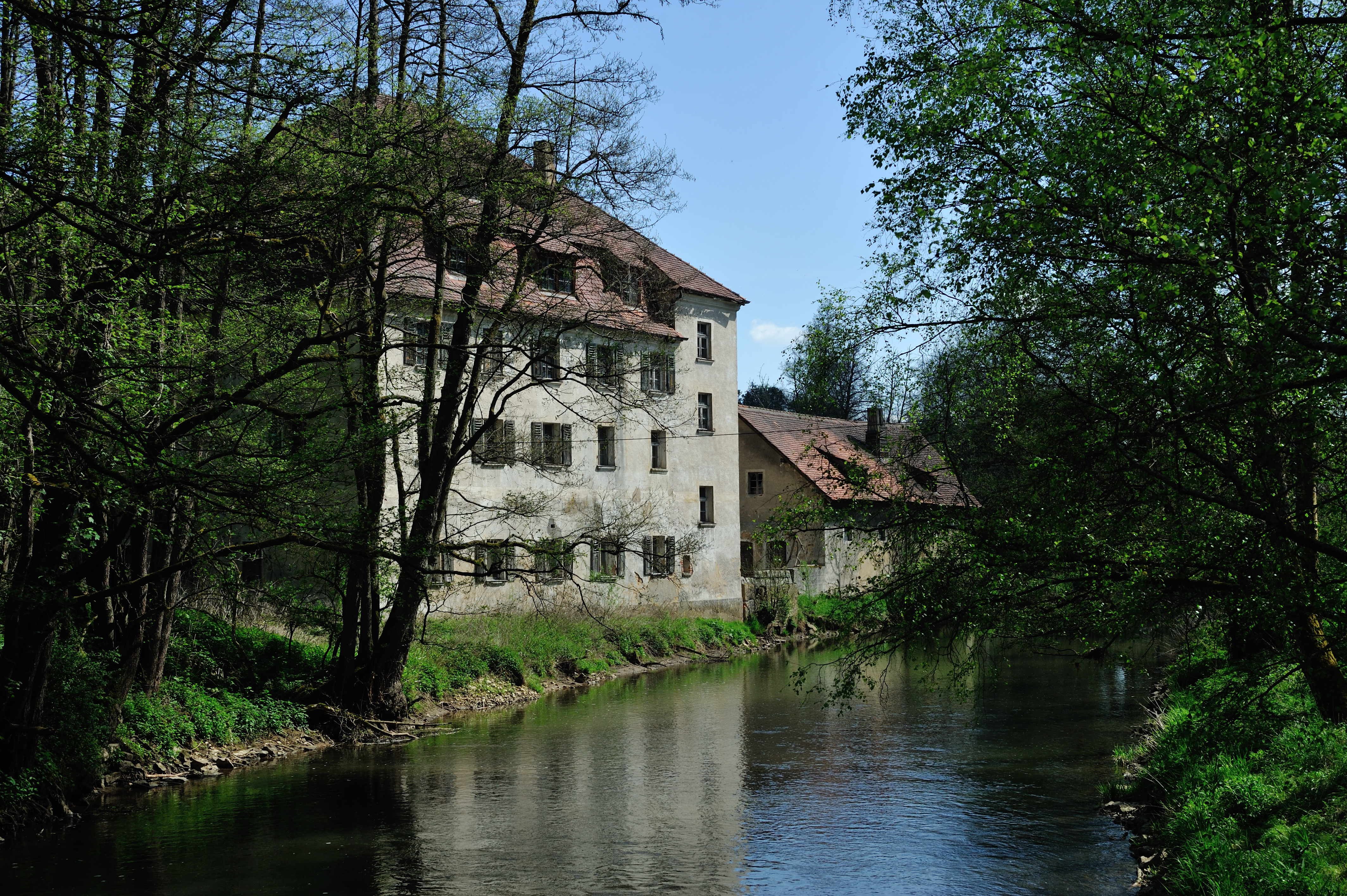 Leidersdorf: Josef Winklersche Kunstmühle, ehem. Hammerschloss, gesehen von der Vilsbrücke